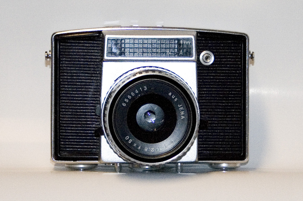 Kamera Pentina von vorne